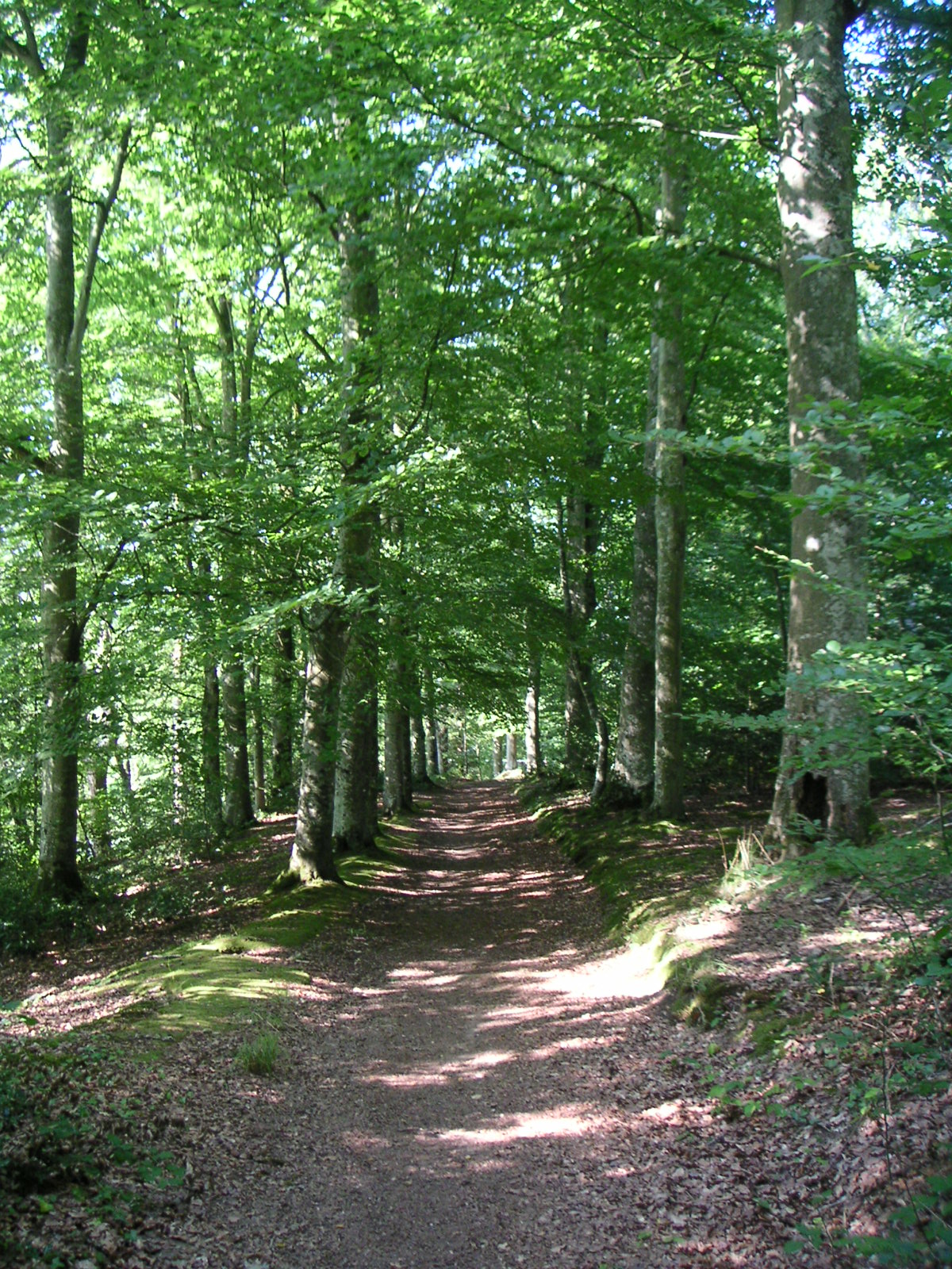 Le bois de la Chesnaie à Saint-Pierre-de-Plesguen. Photo personnelle - TouN - libre de droit Prise le : 17 août 2005